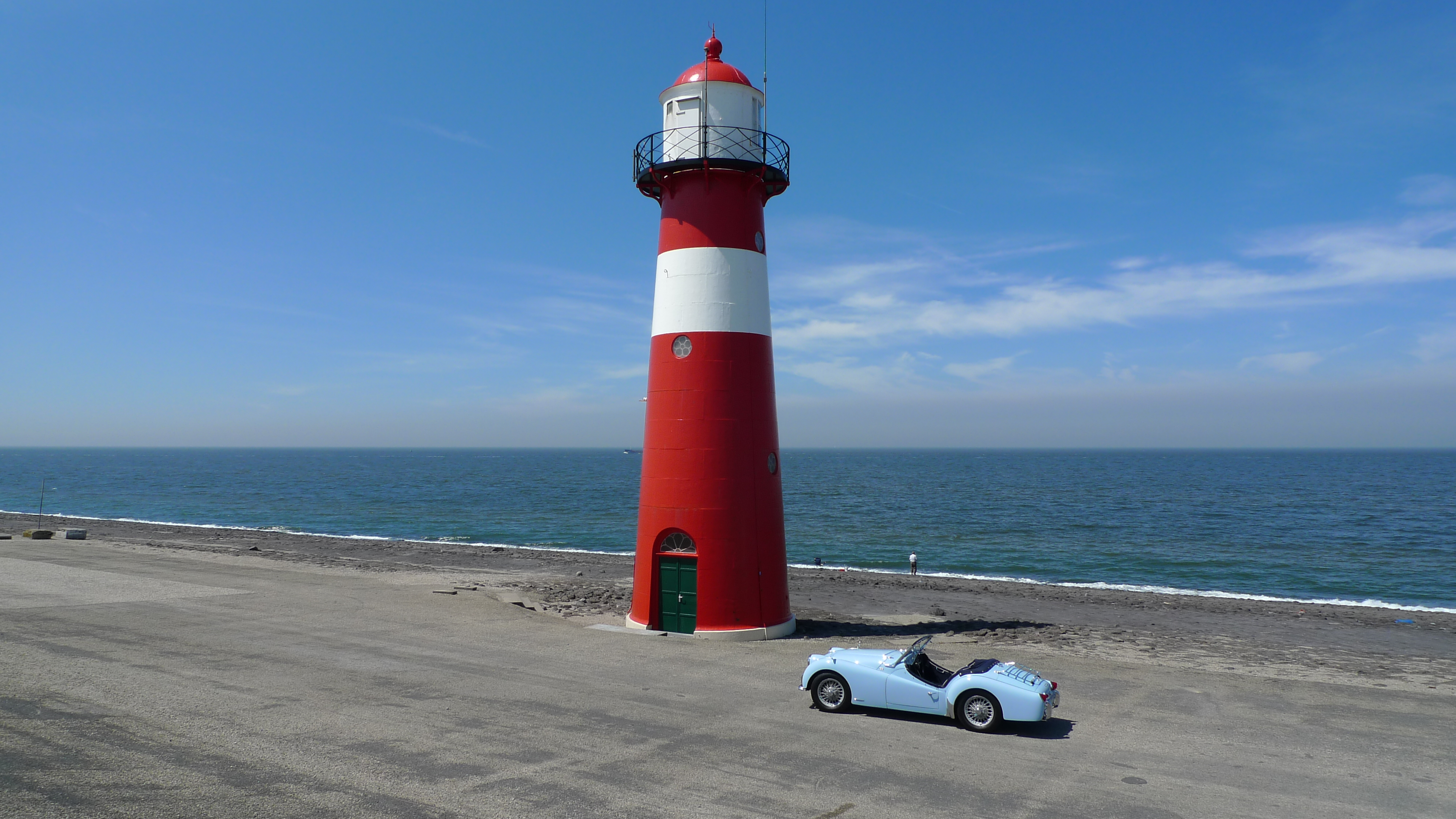 Zomer 2010, het meest westerlijke punt van Nederland met vuurtoren en m'n klassieke Triumph TR3a uit 1959 vormen samen een mooi contrast.